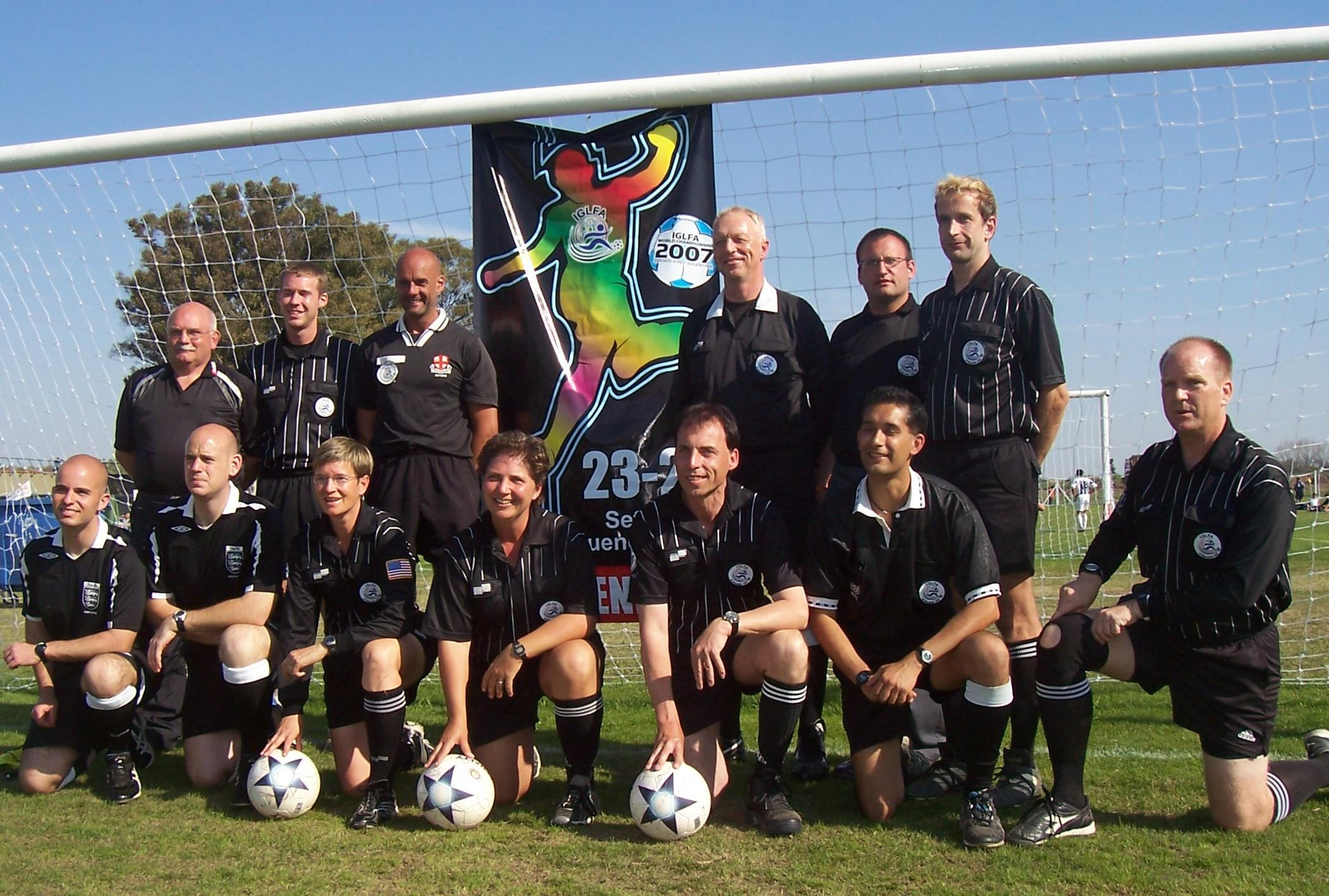 Los referís en el campeonato mundial de fútbol gay-lésbico llevado acabo en la ciudad de Buenos Aires, Argentina.